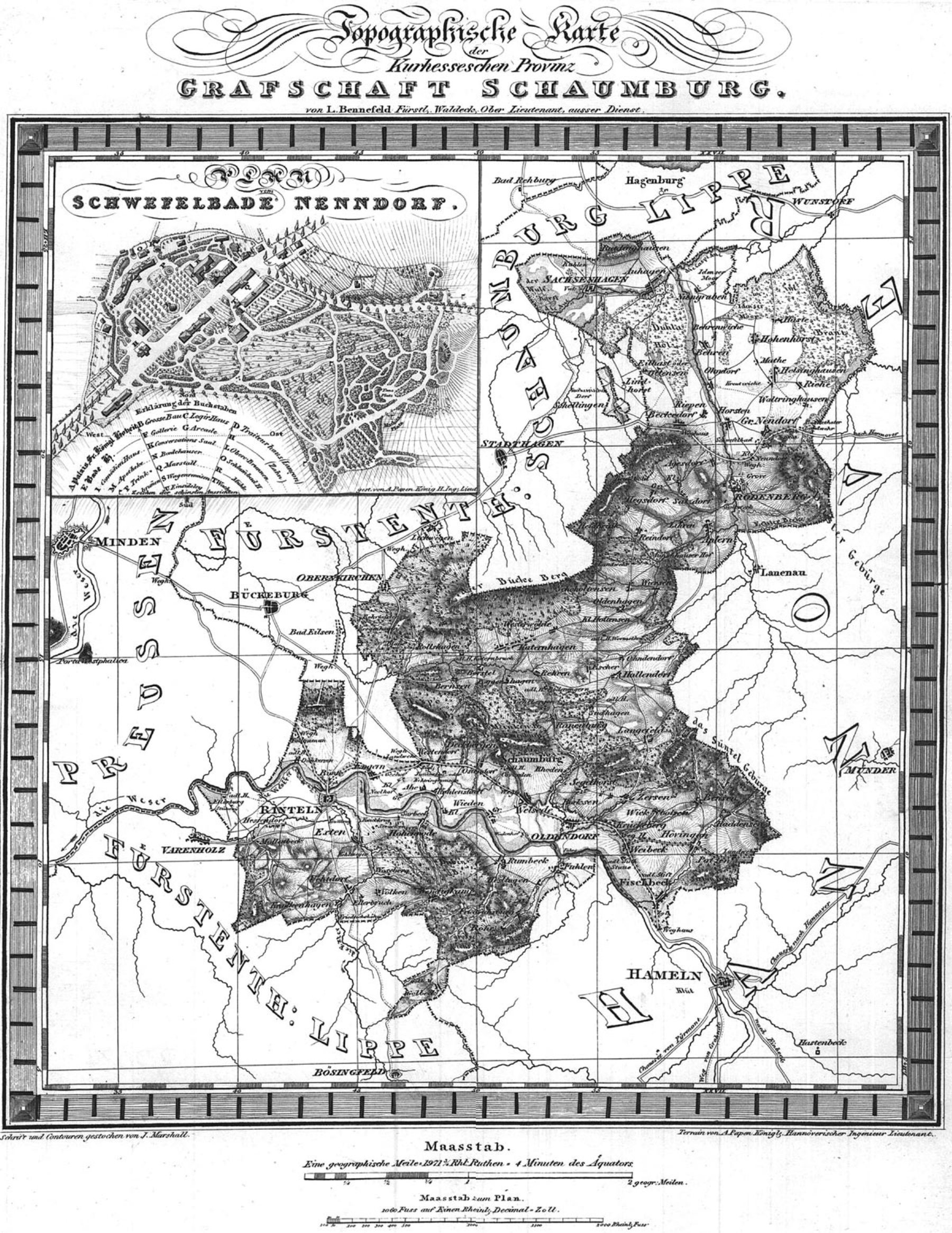 Landkarte der Grafschaft Schaumburg hessischen Anteils mit Plan vom Schwefelbade Nenndorf, um 1840